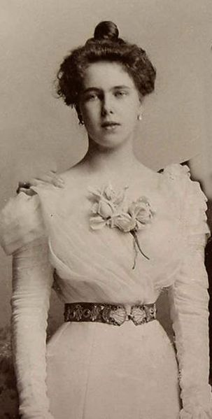 Origen: [1]